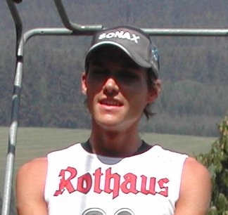 Sven Hannawald beim Sommerspringen 2003 in Hinterzarten